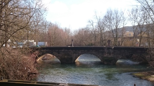 Lauda Kulturdenkmal